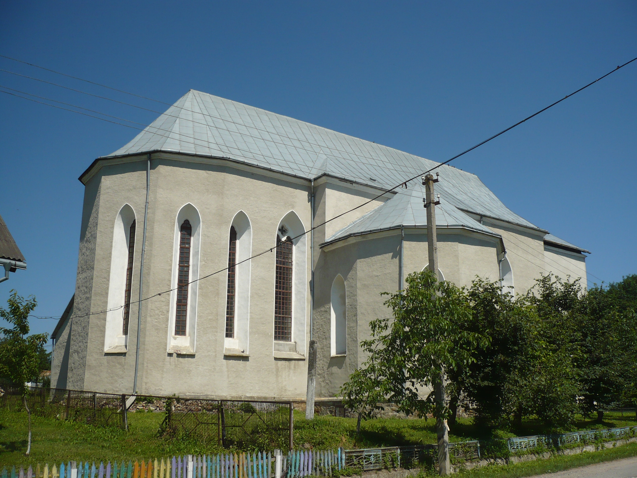 Potok Złoty. Kościół